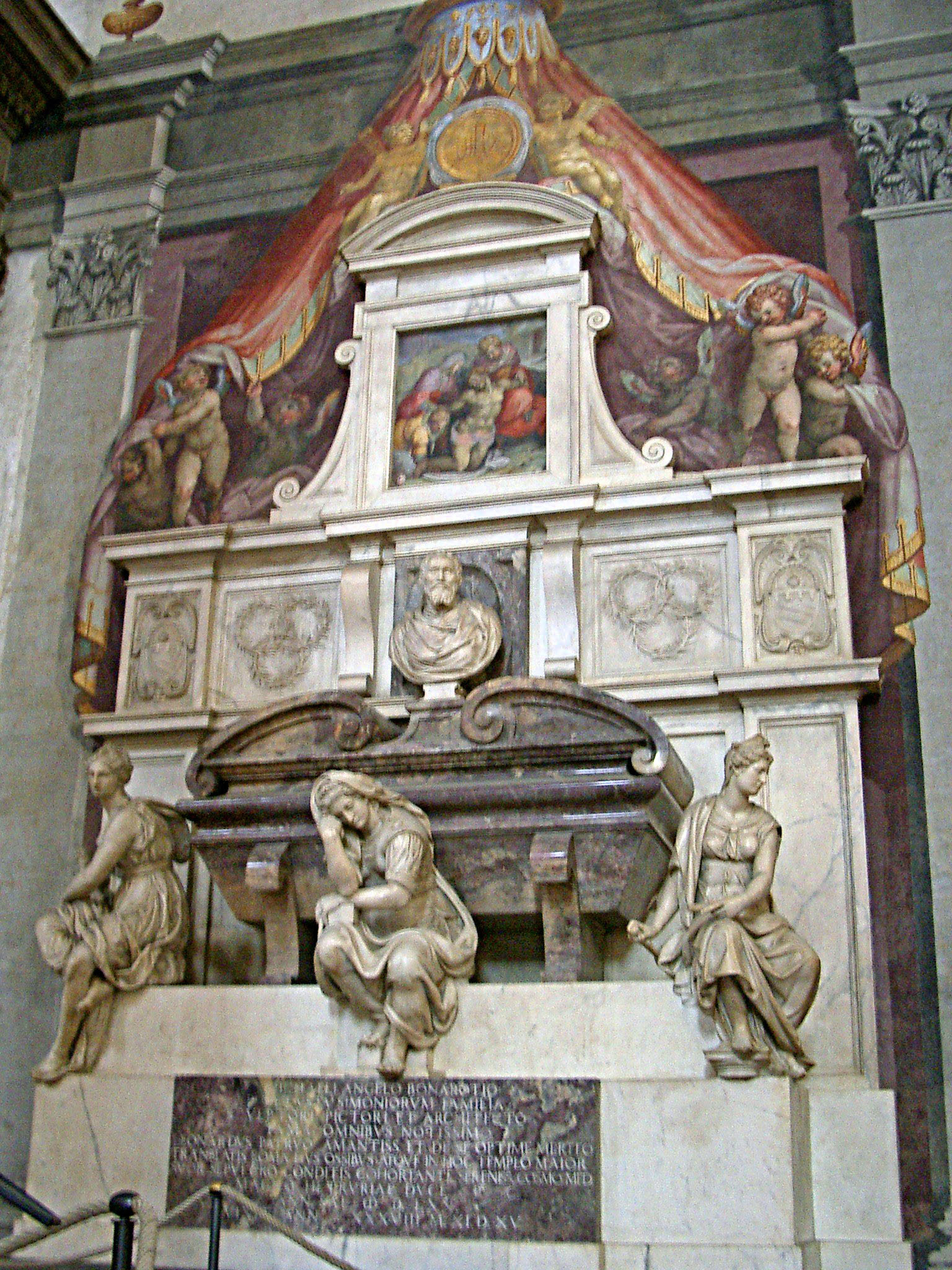 Grabmal Michelangelos in der Kirche "Santa Croce" in Florenz